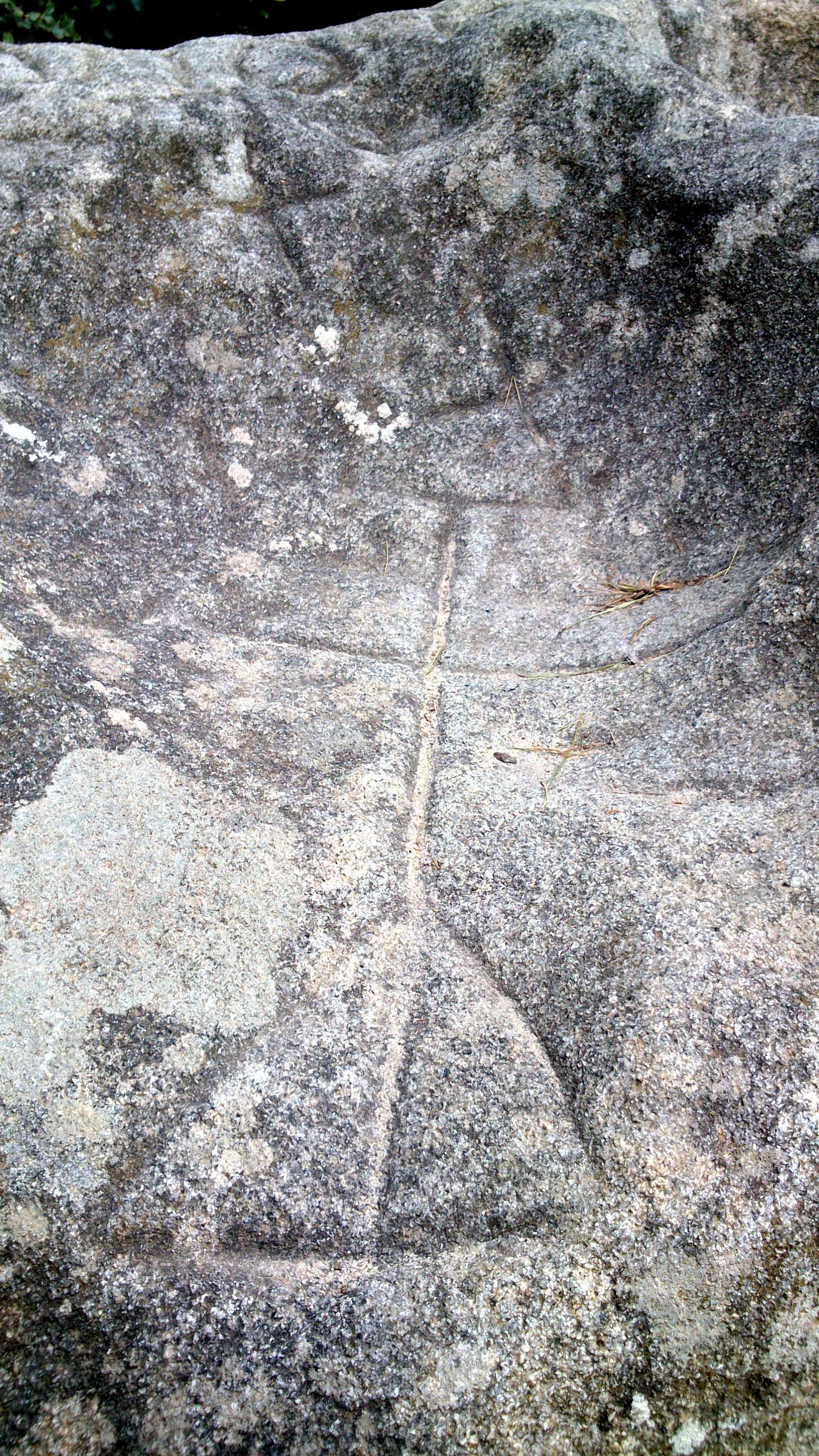 Gravats a la pedra de les creus This is a photography of a Special Area of Conservation in Spain with the ID: ES5110011. Natura2000 entry, EEA entry